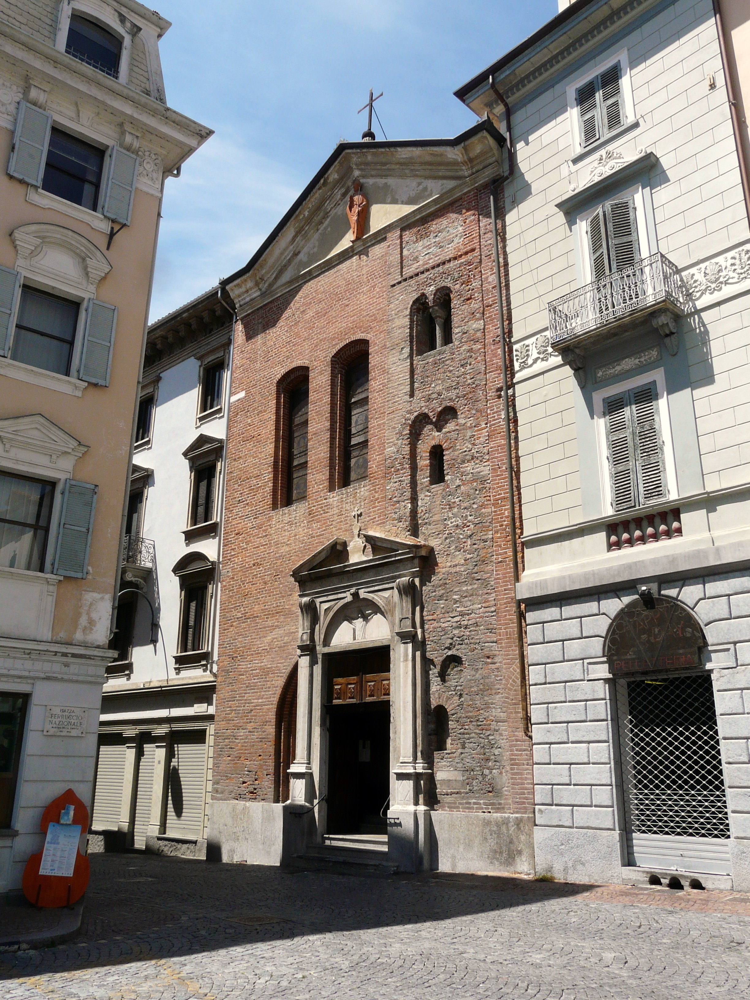 Chiesa di San Ulderico, Ivrea, Piemonte, Italia